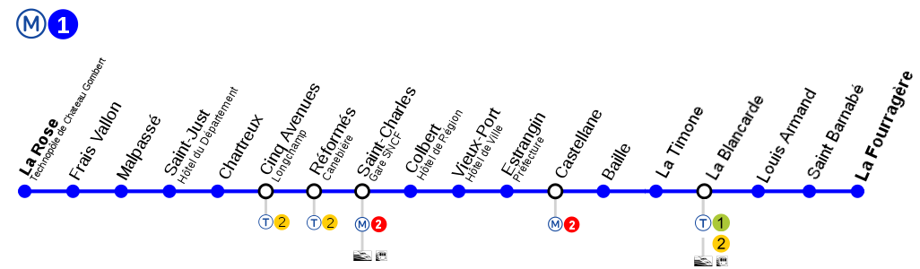 Plan de la ligne 1 du métro de Marseille